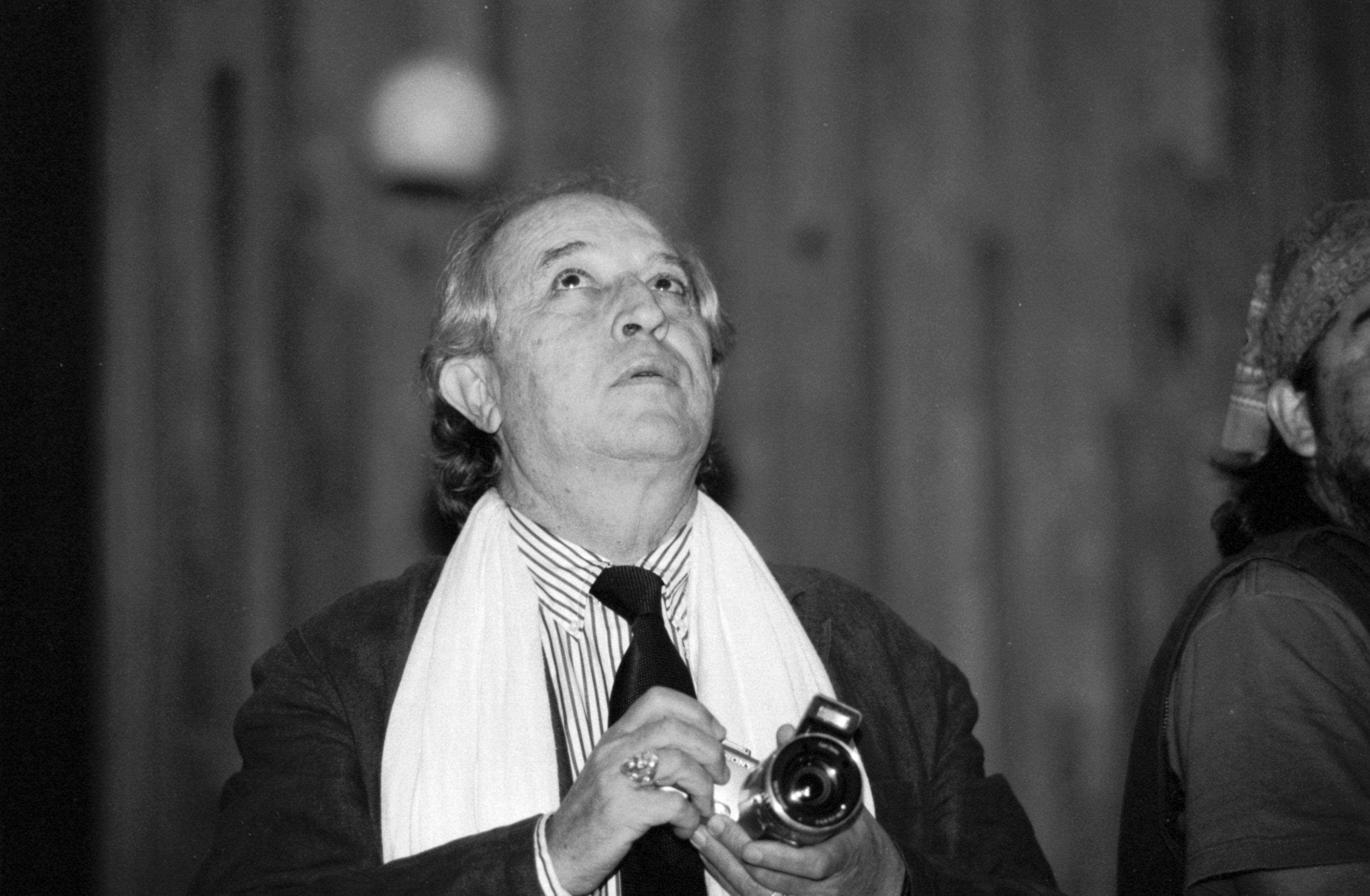 V. Storaro 04